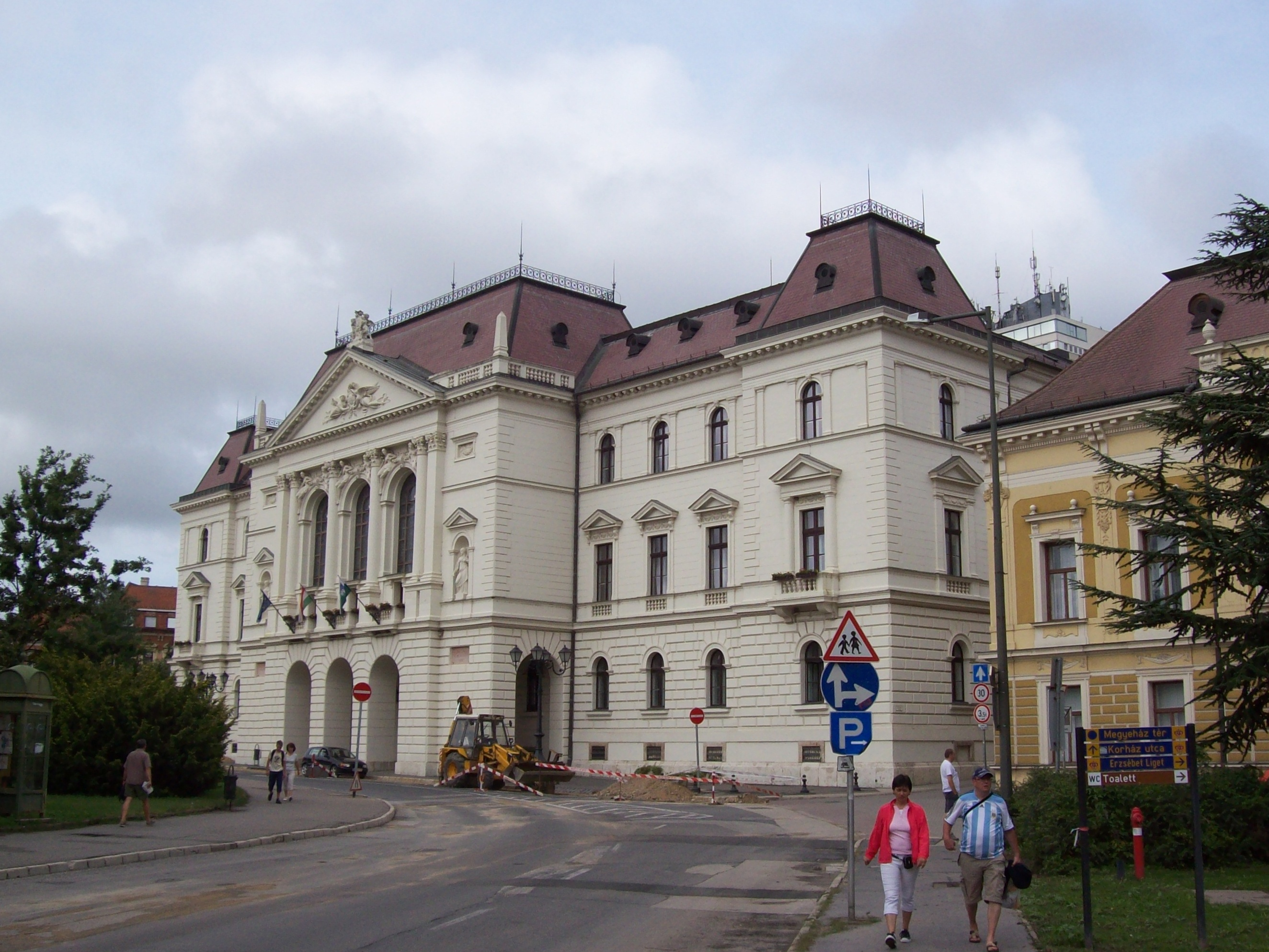 Veszprém Megye háza